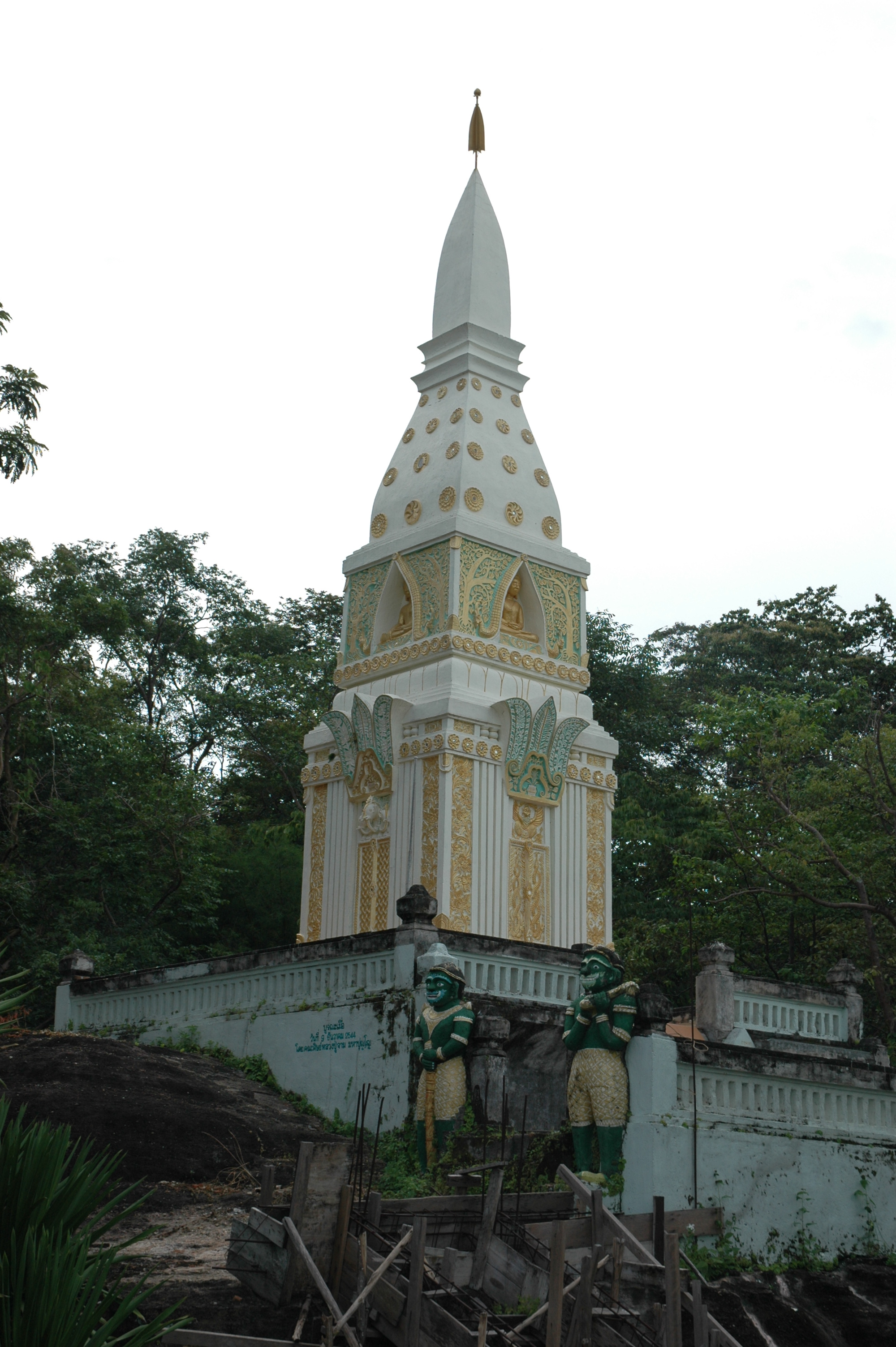 Tempel-Replik im Wat Phra Puttha Bath Bua Bok, Phu Phrabat Historical Park, Udon Thani, Thailand